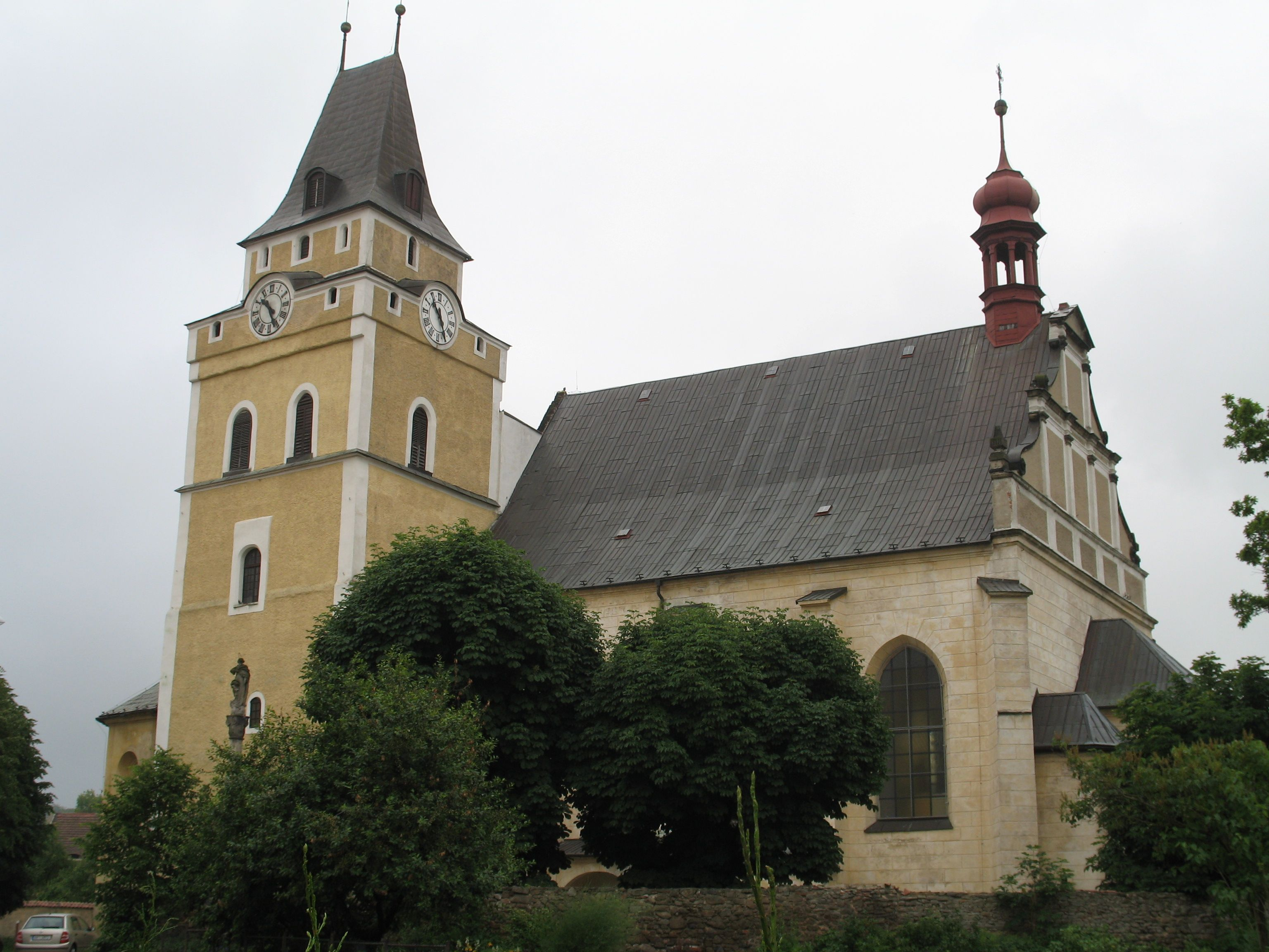 Kostel Nalezení svatého Kříže ve Frýdlantě, okres Liberec